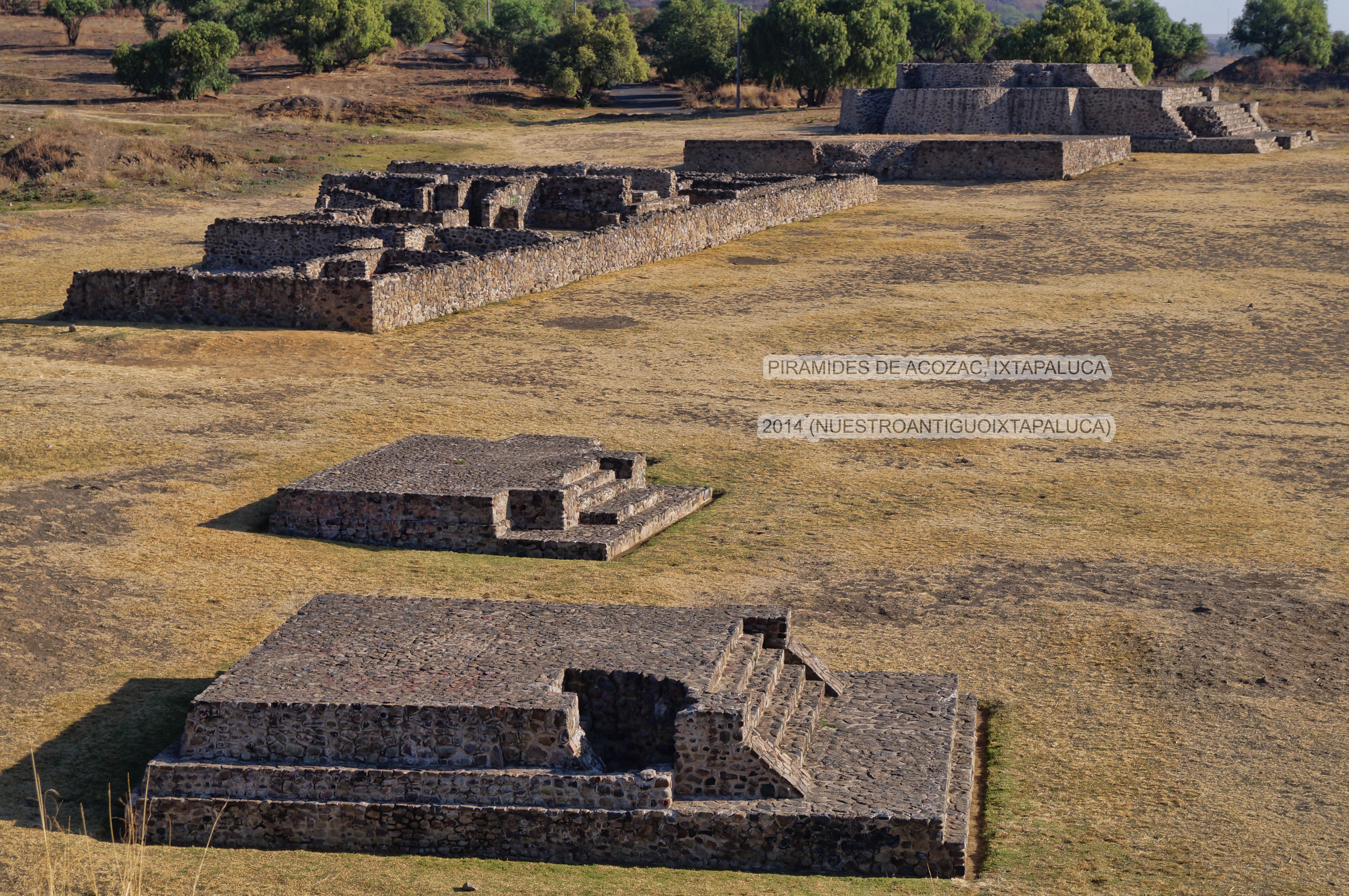 PIRAMIDES DE ACOZAC IXTAPALUCA, FOTO 2014 HDFULL. CORTESIA DE : NUESTROANTIGUOIXTAPALUCA This image contains digital watermarking or credits in the image itself. The usage of visible watermarks is discouraged. If a non-watermarked version of the image is available, please upload it under the same file name and then remove this template. Ensure that removed information is present in the image description page and replace this template with Metadata from image or Attribution metadata from licensed image . Caution: Before removing a watermark from a copyrighted image, please read the WMF's analysis of the legal ramifications of doing so, as well as Commons' proposed policy regarding watermarks. If the old version is still useful, for example if removing the watermark damages the image significantly, upload the new version under a different title so that both can be used. After uploading the non-watermarked version, replace this template with Superseded|new filename|version without watermarks .